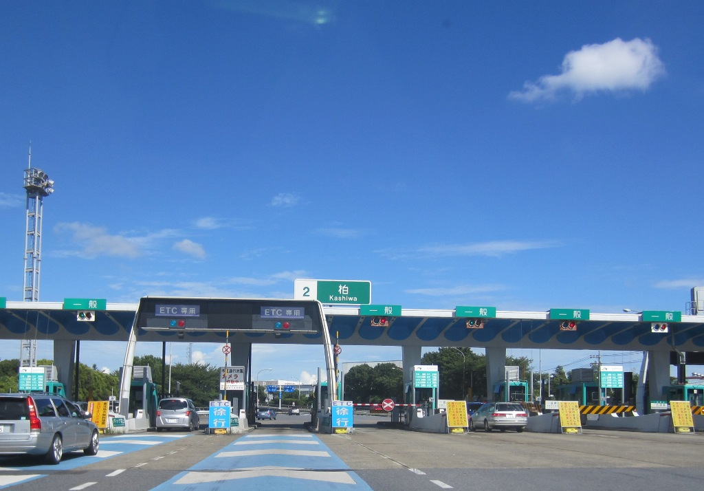 柏インターチェンジ（料金所）